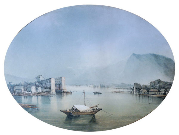 Морской пейзаж, привезённый И. А. Гончаровым из кругосветного путешествия на фрегате "Паллада"